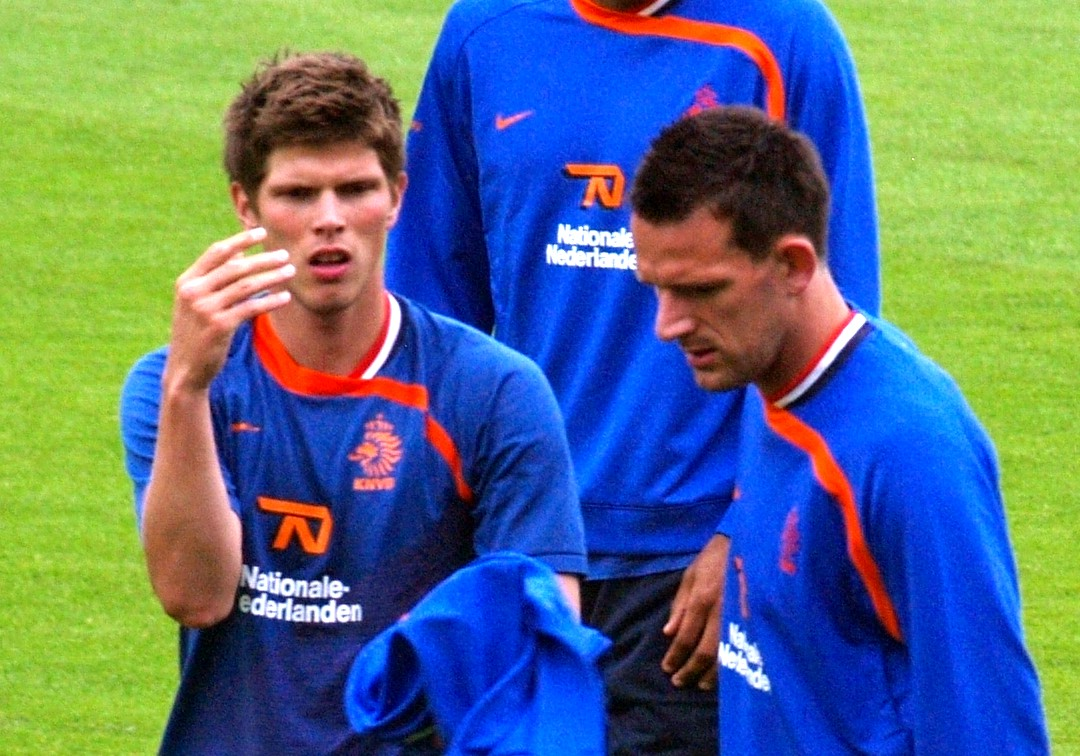 Klaas-Jan Huntelaar & Jan Vennegoor of Hesselink